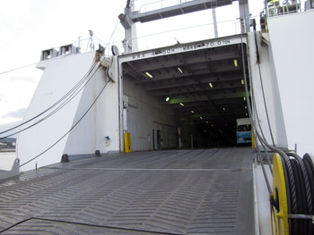 貨物船・新さつま